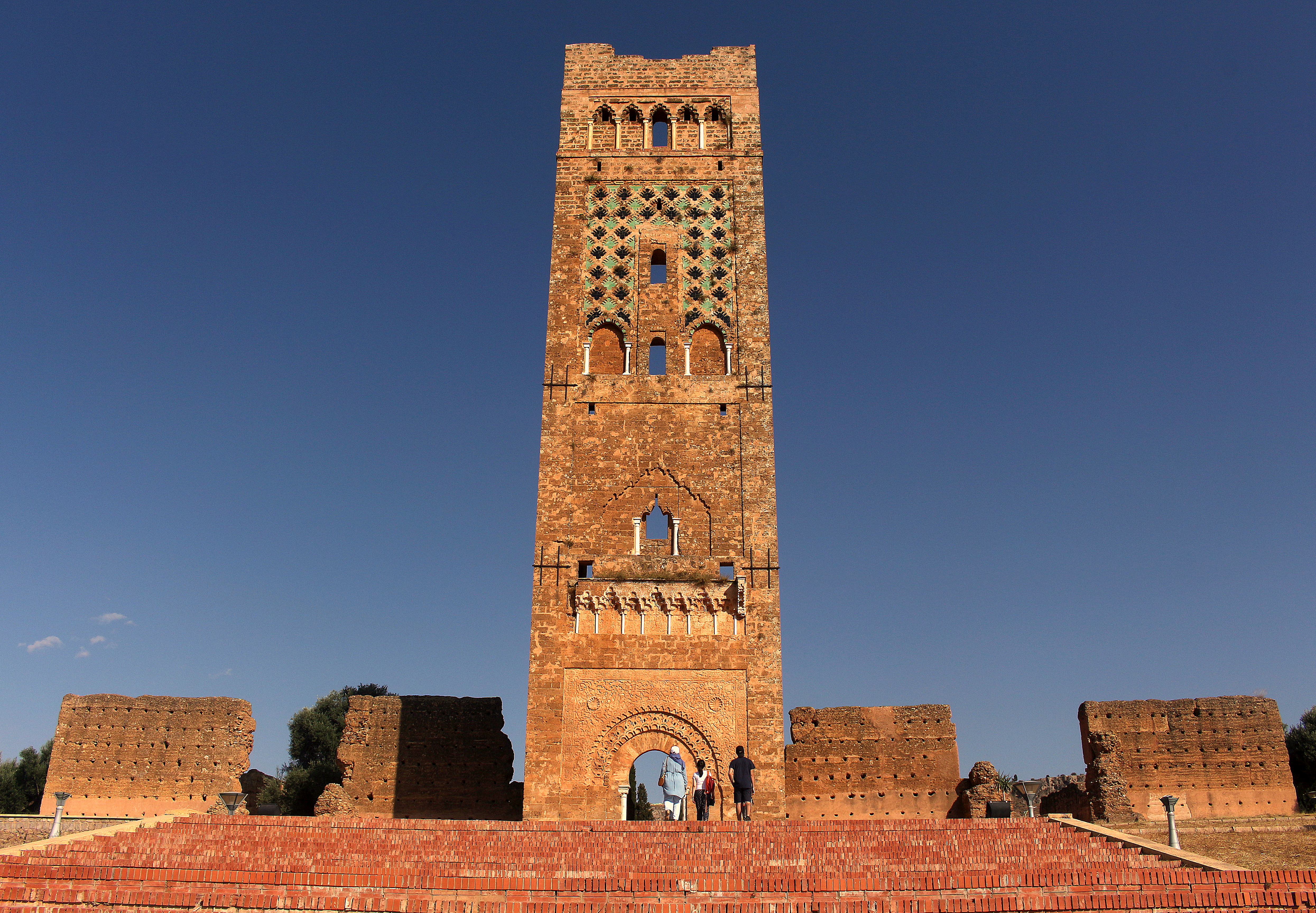 La première fois que nous nous fassions face, un minaret d’où on fait l'appel à la prière mais aussi un emblème de cette magnifique ville de Tlemcen, un témoignage de la civilisation islamique ancestrale, une prouesse de la technique de construction, et l'art de l'harmonie esthétique, sa monumentalité est encore plus valorisé avec la construction des escaliers, présenté comme il se doit.